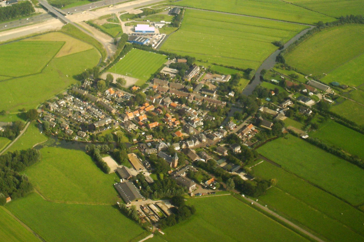 Dorp Nieuwer ter Aa bij Breukelen. Village Nieuwer ter Aa nearby Breukelen Netherlands